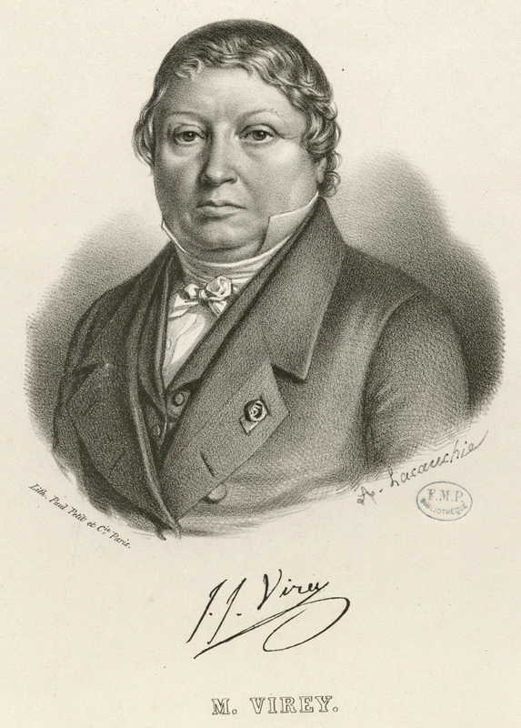 M Virey